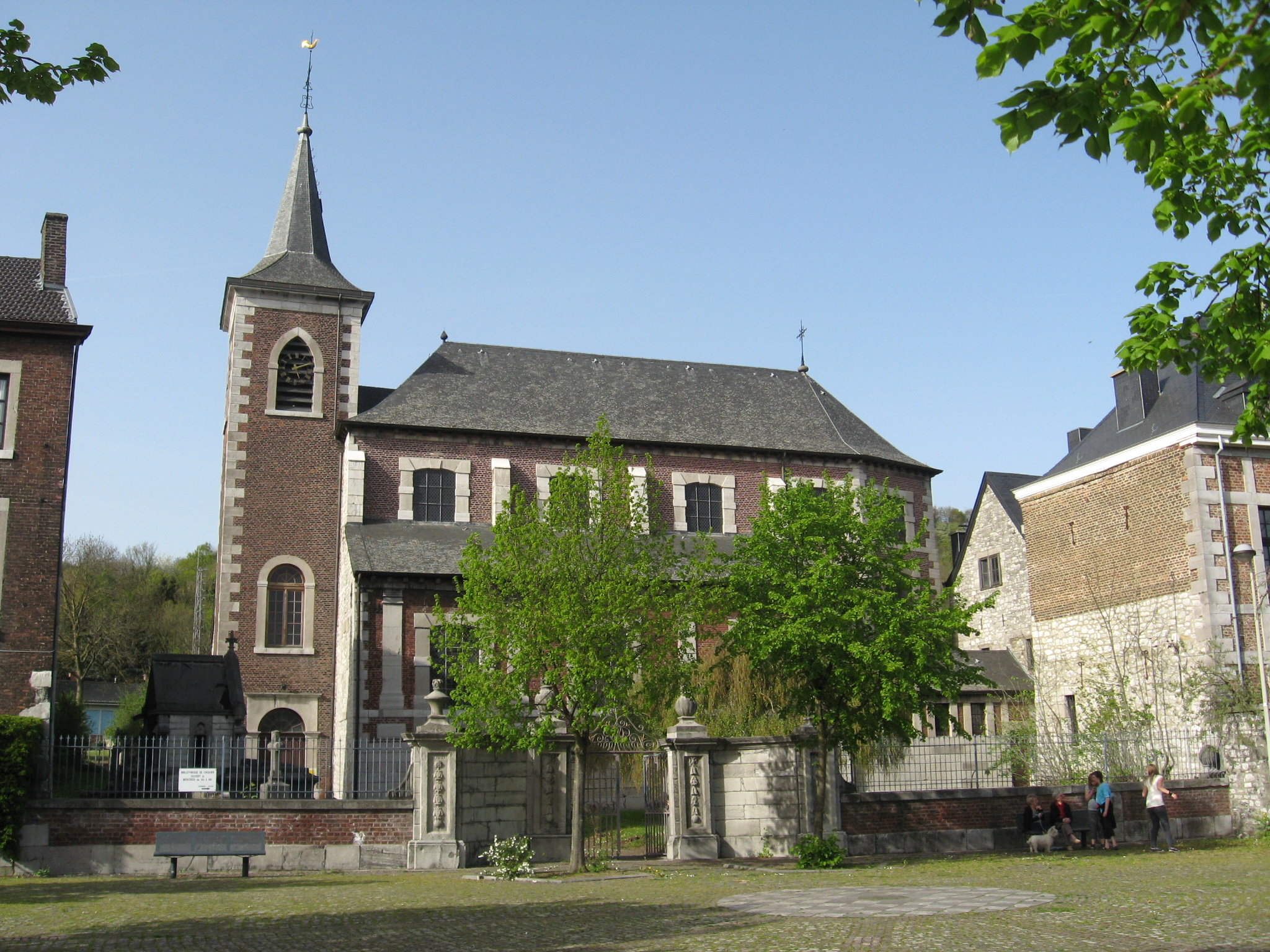 Sint-Macellinuskerk in Chokier